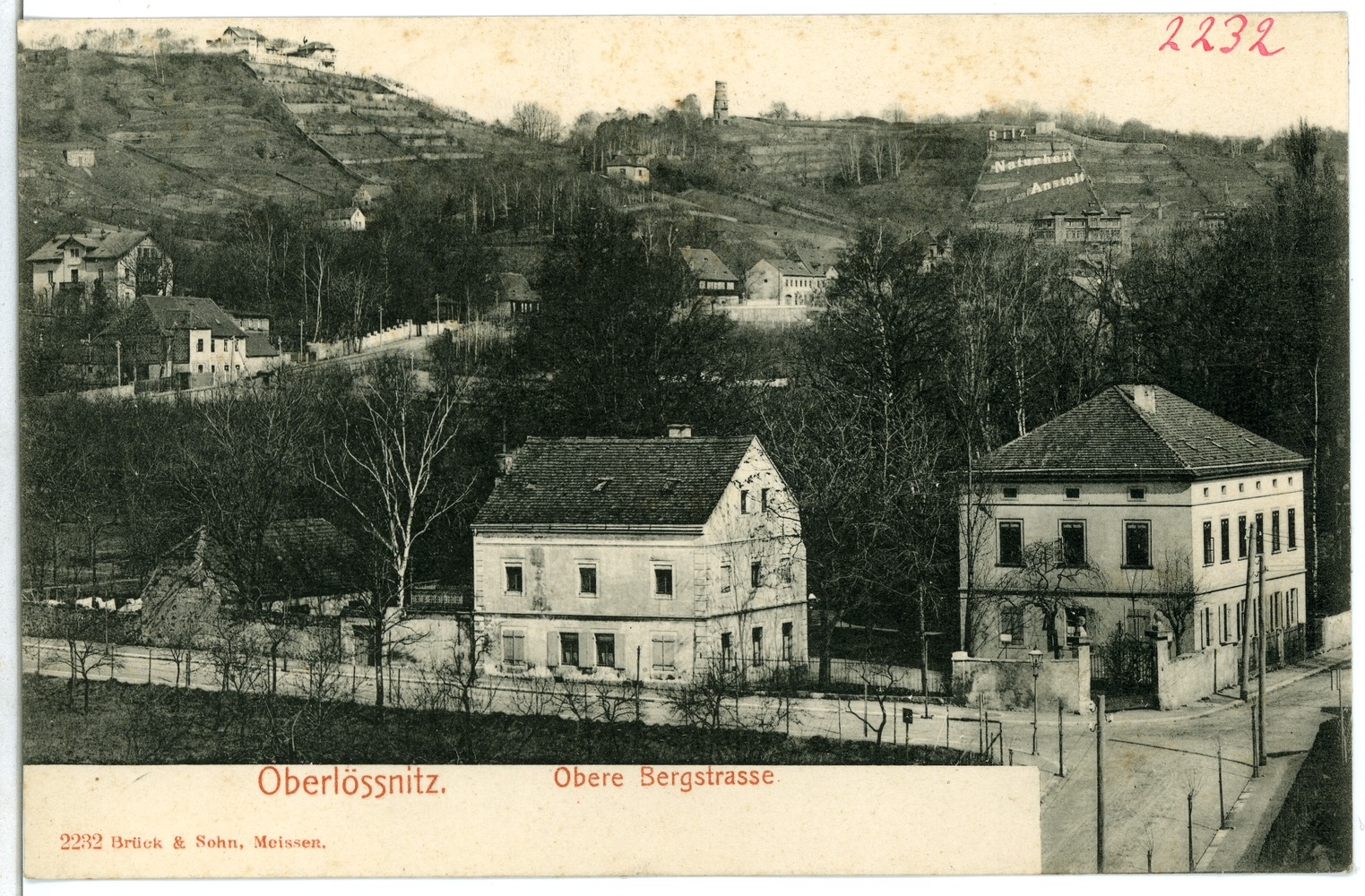 Oberlößnitz; Obere Bergstraße This postcard is from publisher Brück & Sohn in Meißen ( postcard has a unique number 02232 and is available in a higher resolution at the publisher. This images was uploaded in a cooperation project between Wikipedians and the publisher.